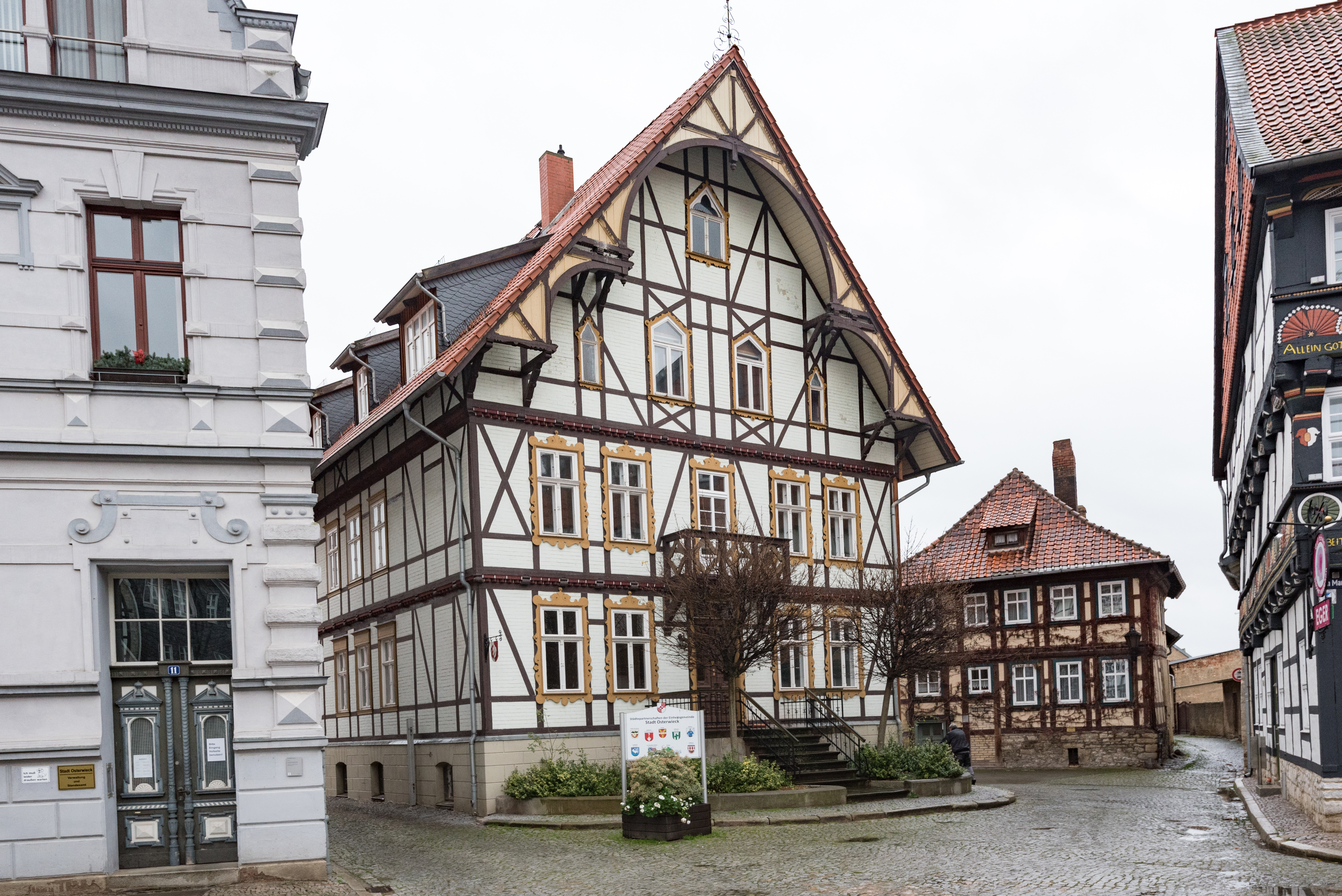 Osterwieck, Am Markt 12